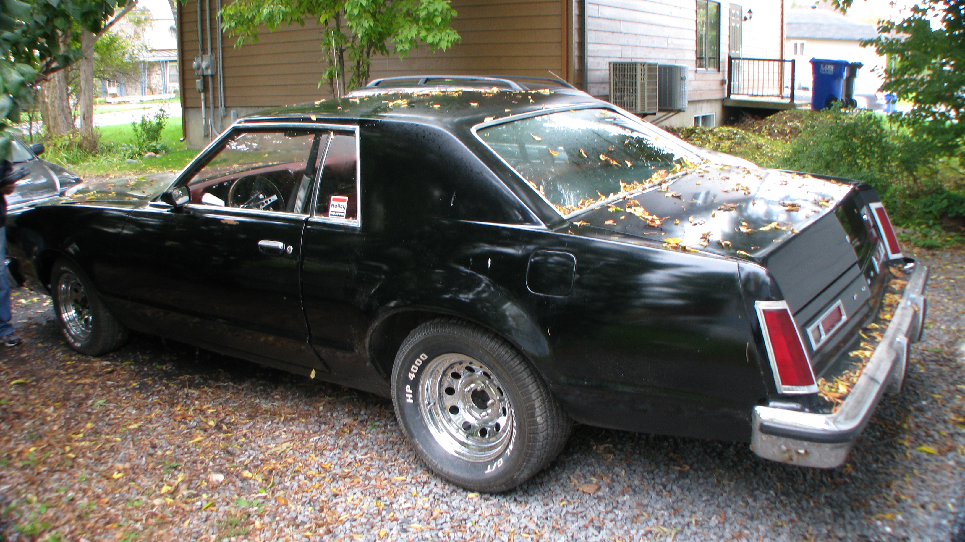 Ford LTD II, 1978 года выпуска